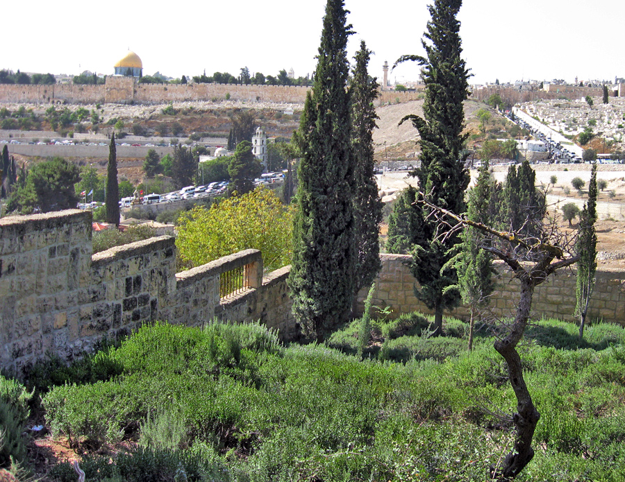 Orson Hyde memorial park in Jerusalem Israel